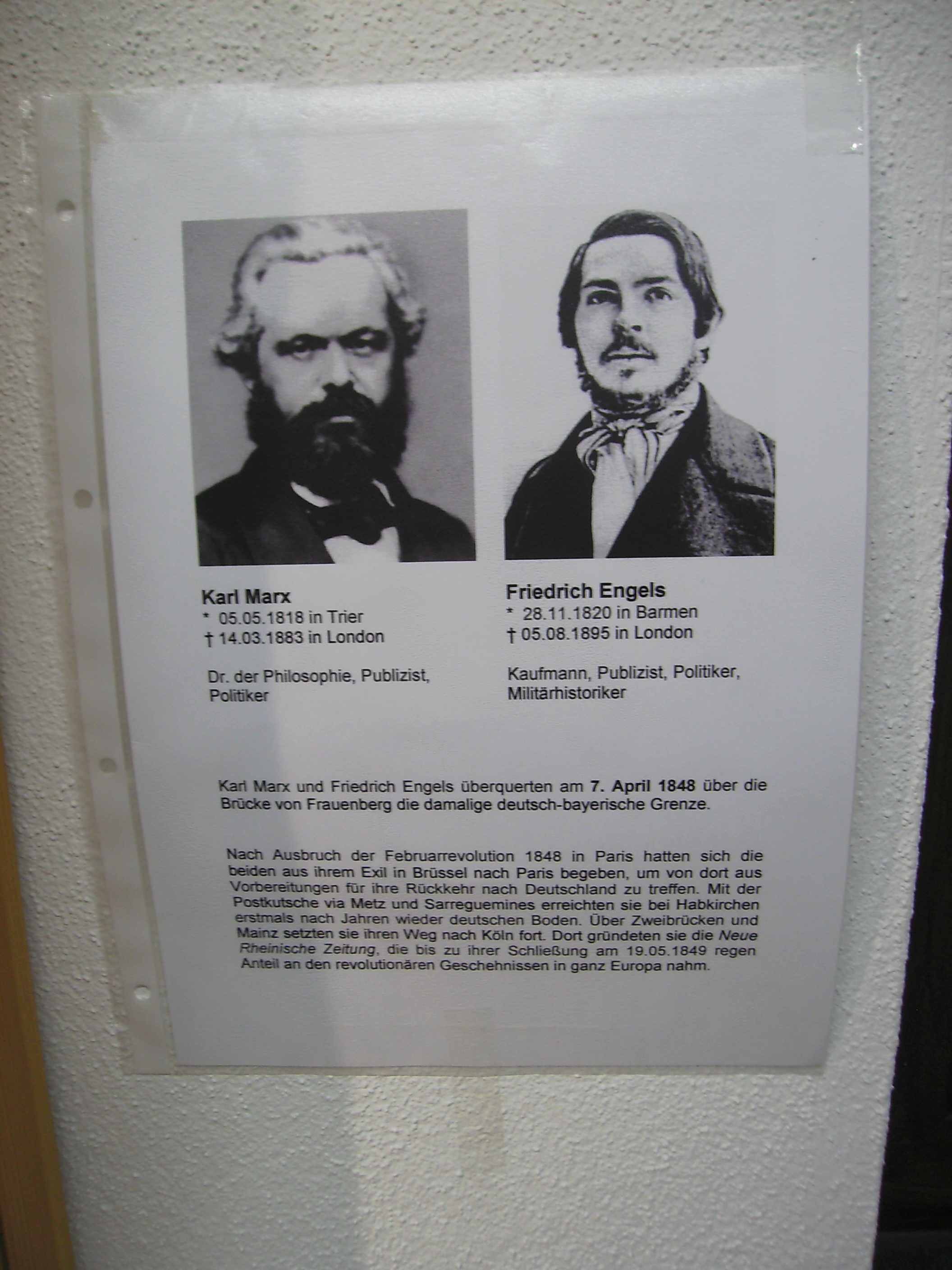 Zollmuseum Habkirchen: Legende zur Grenzüberquerung von Karl Marx und Friedrich Engels in Habkirchen am 7. April 1848